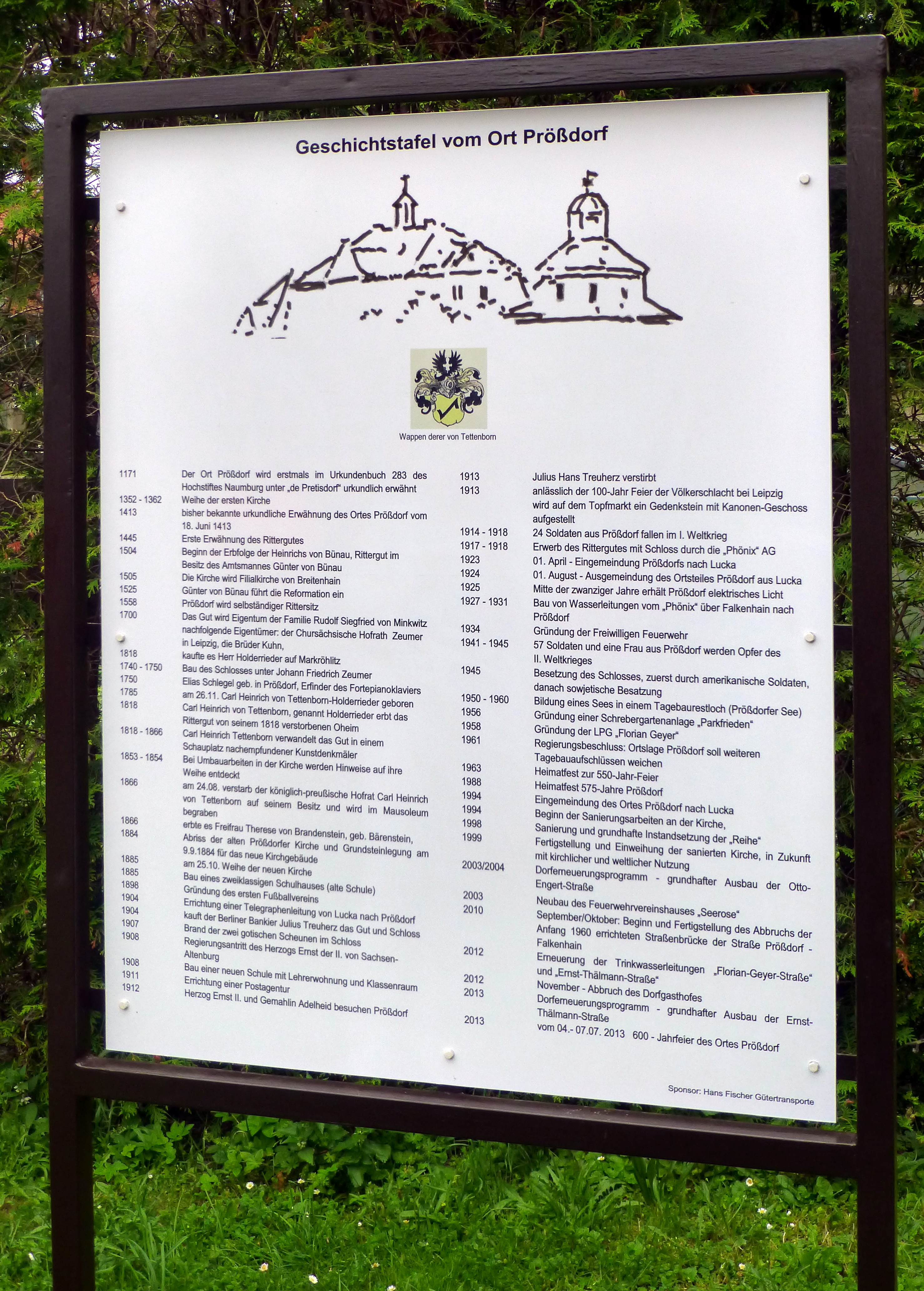 Prößdorf Geschichtstafel 2013